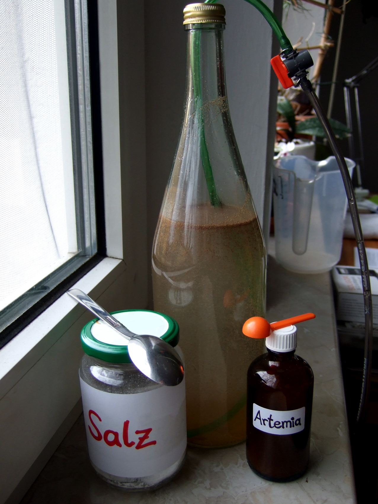 Einfache Flasche mit Luftschlauch zum Erbrüten von Artemiacysten